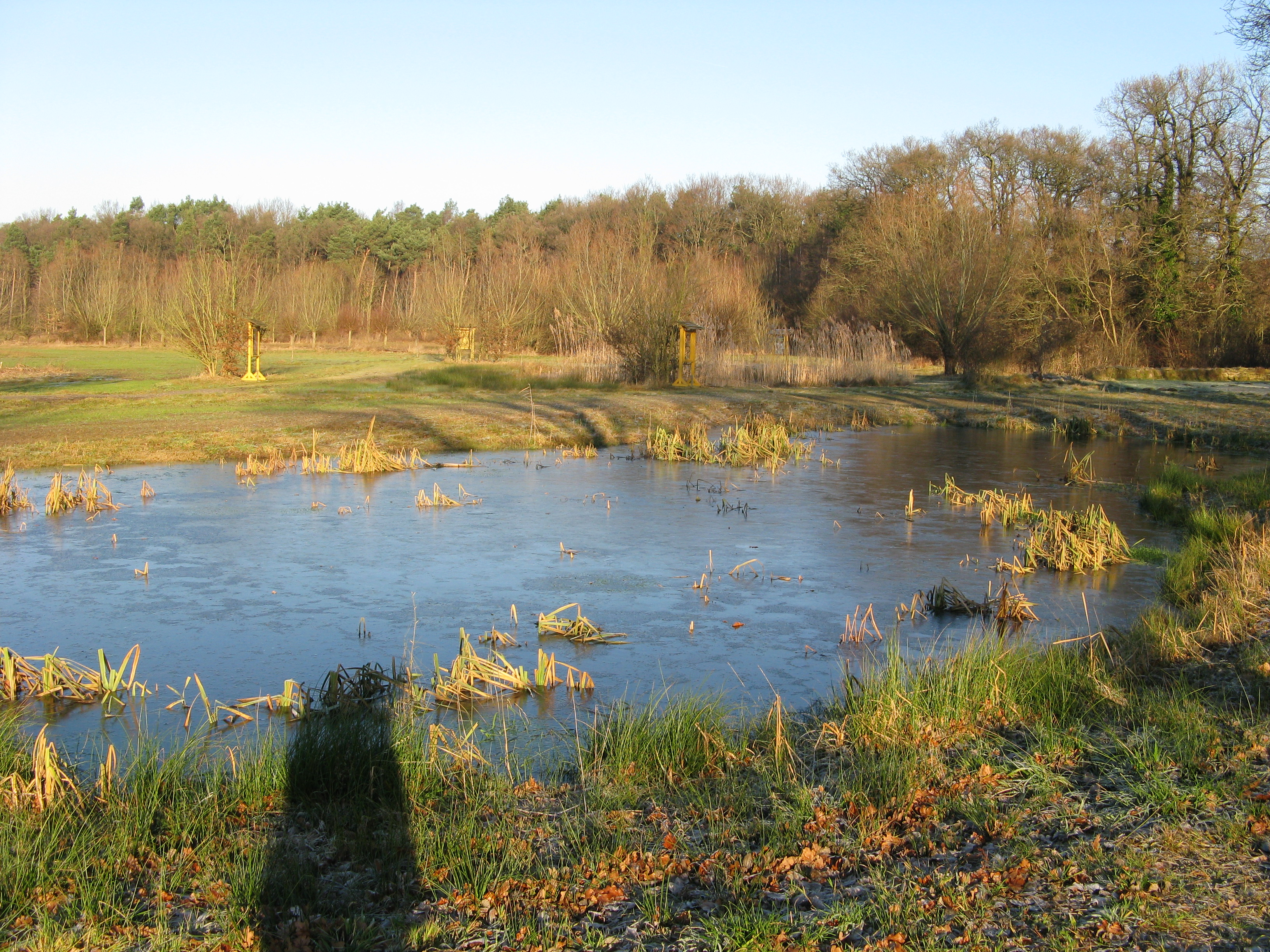 Kleingewässer im Naturschutzgebiet Nordholz bei Minden, Nordrhein-Westfalen.